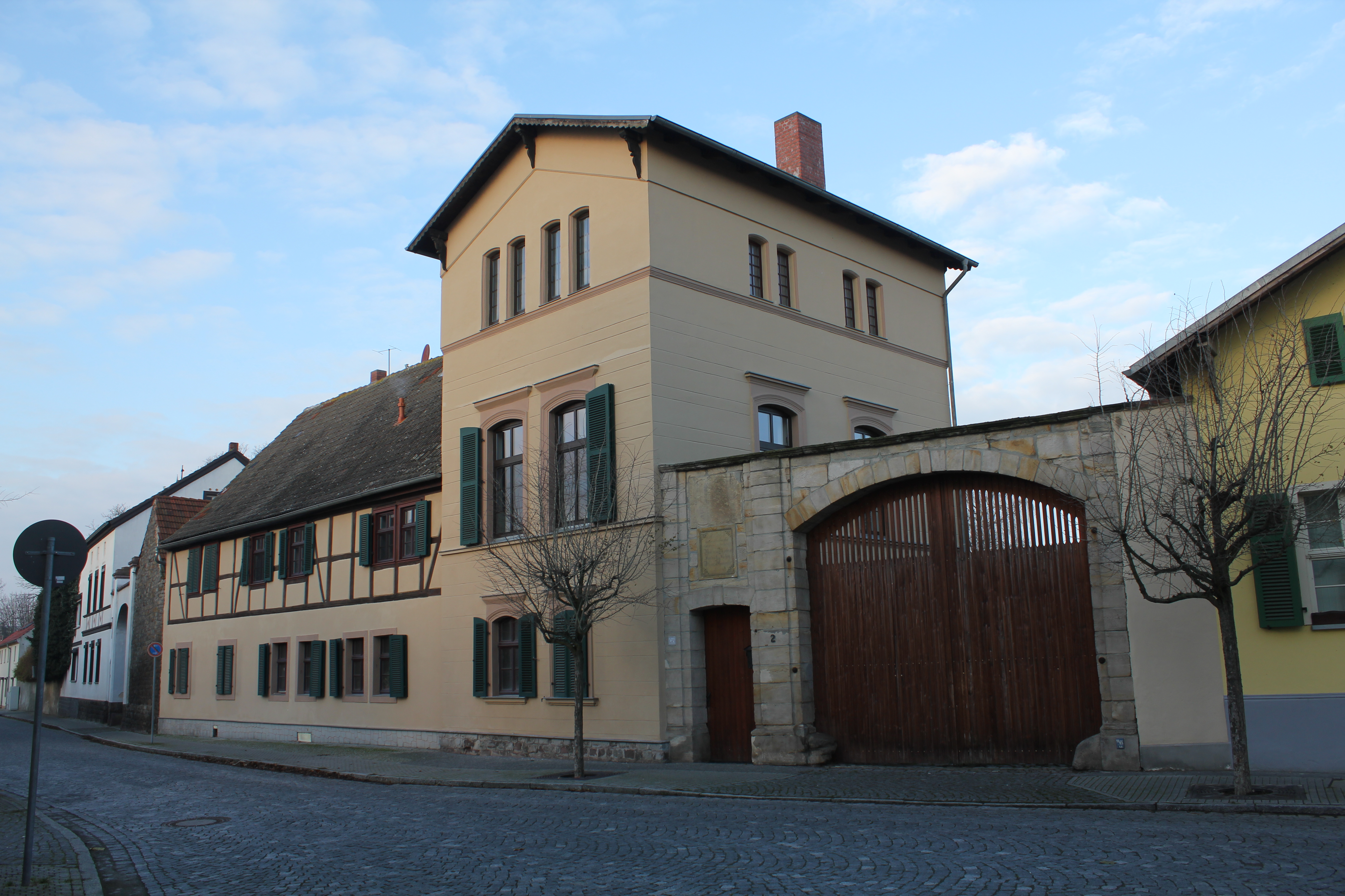 Wohnhaus, Ernst-Thälmann-Str.2, Barleben